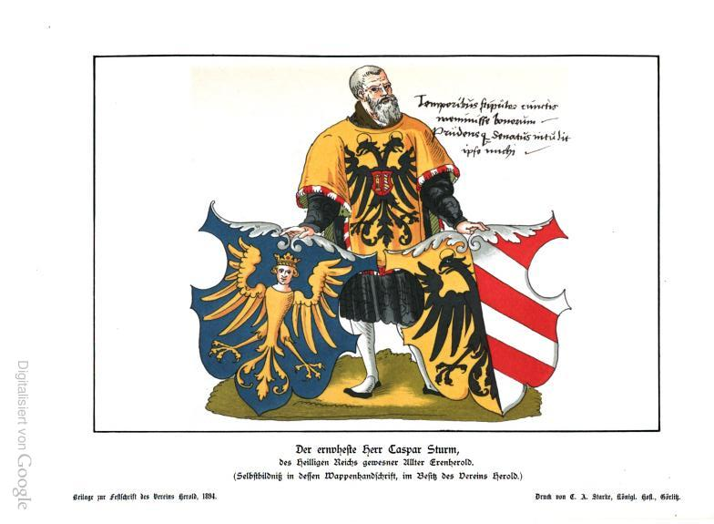 Selbstbildnis des Herolds Caspar Sturm in seinem Wappenbuch - Mit dem Kleinen und Großen Nürnberger Stadtwappen